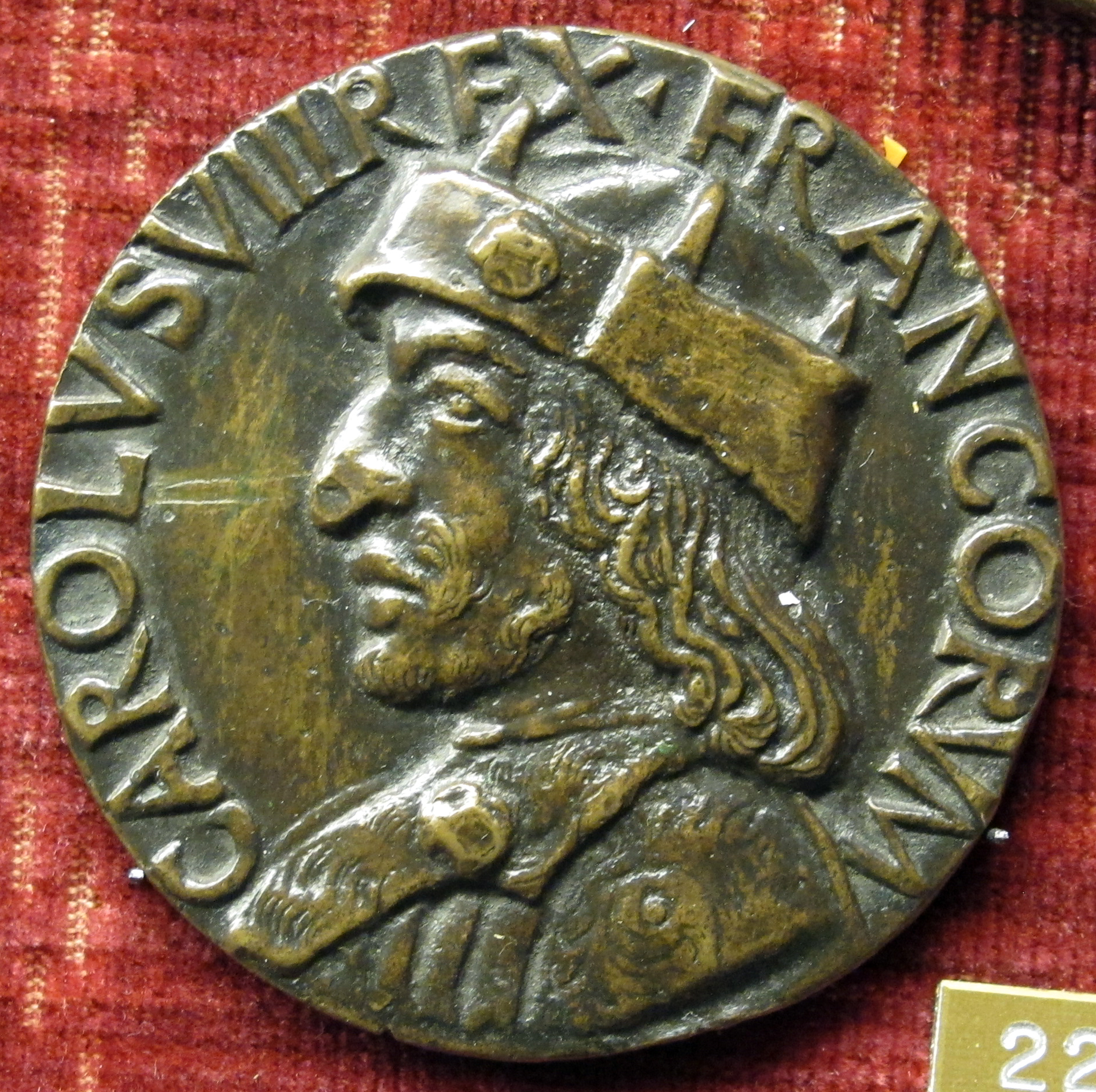 Medaglia di Carlo VIII di Francia (1470-1498), recto